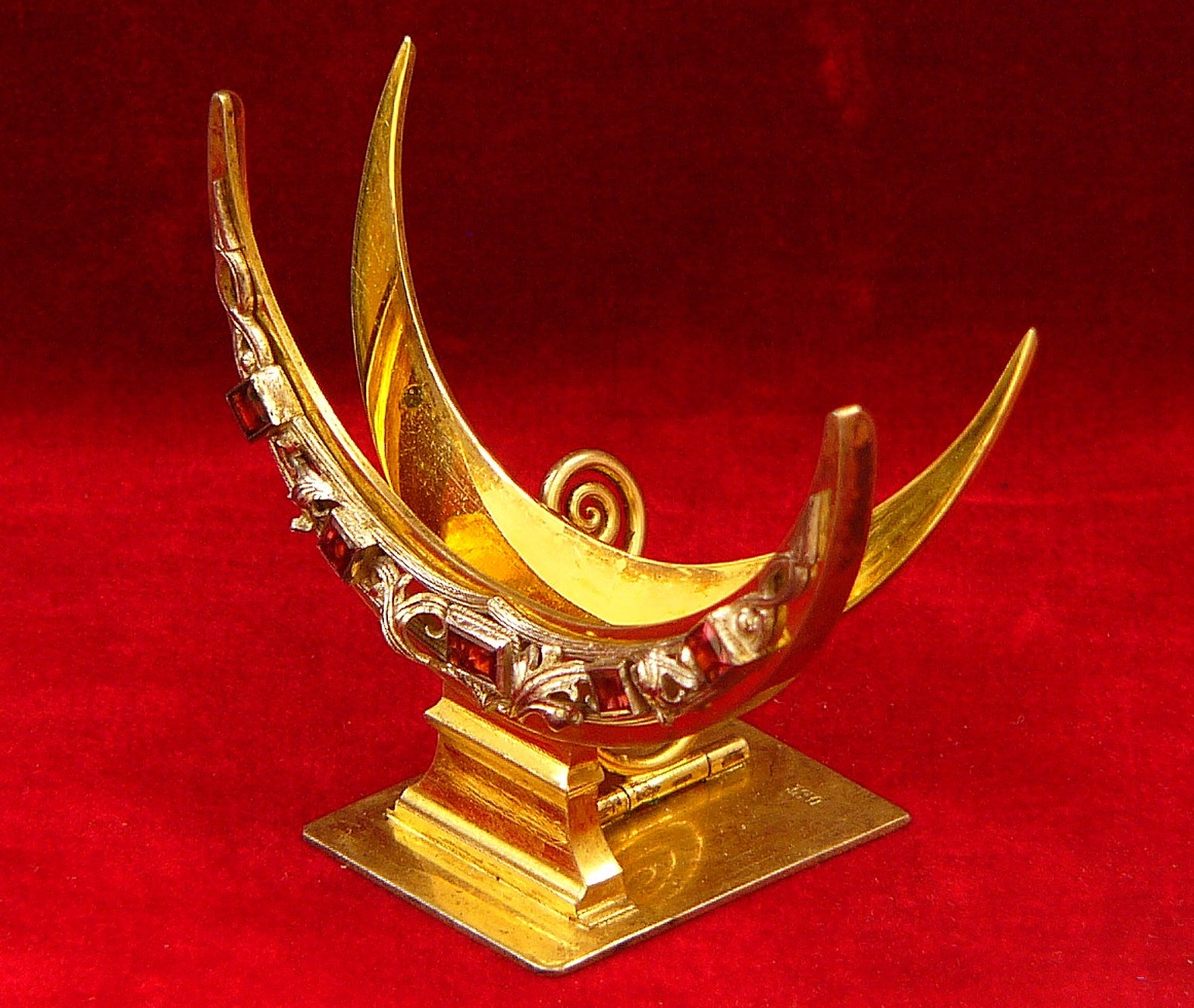 Lunula - lat.: kleiner Mond; eine Halterung für konsekrierte Hostie.